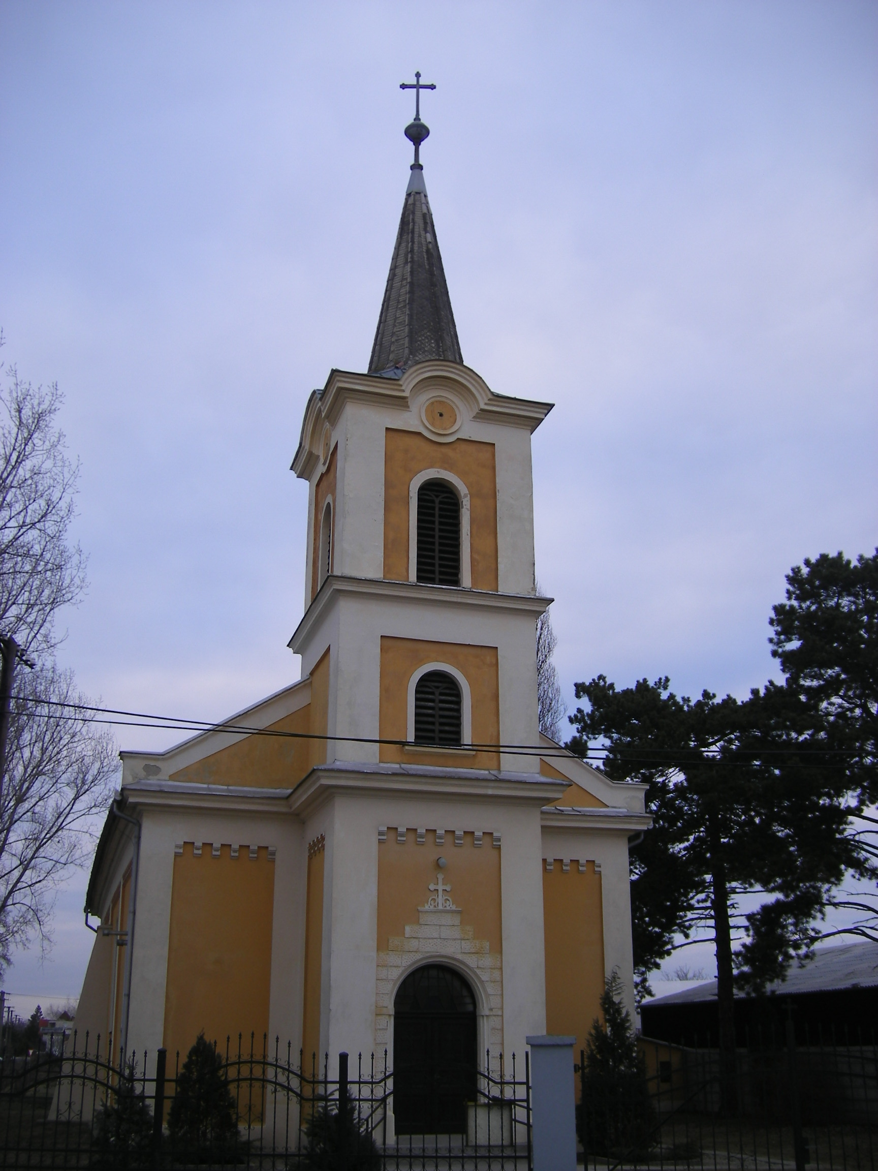 Npvá Stráž, r.k. kostol; Őrsújfalu, római katolikus templom